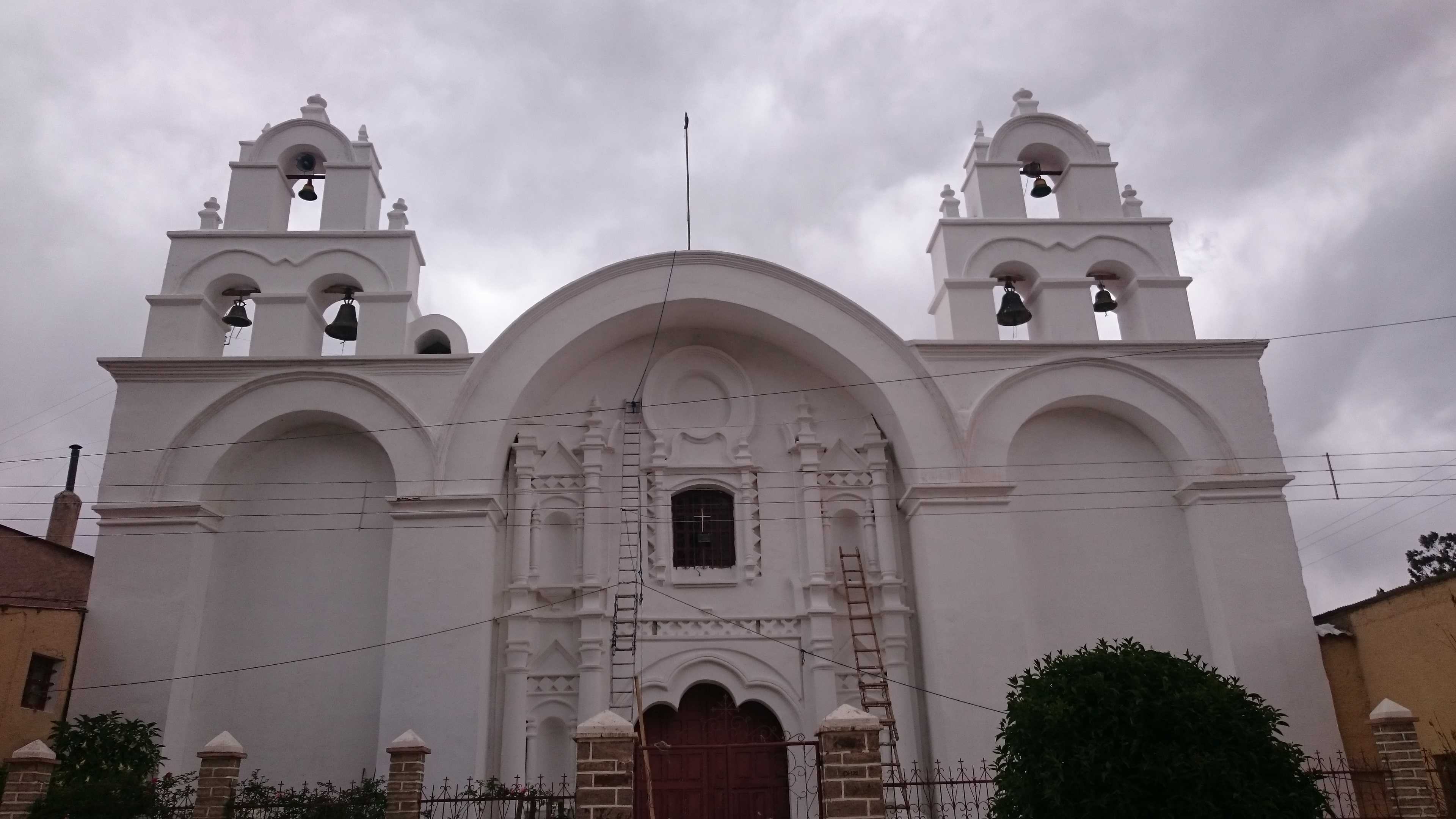 Potosí-Bolivia